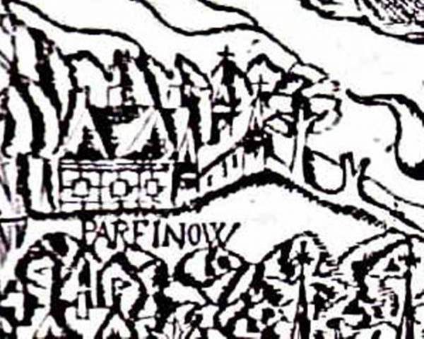 Беларуская (тарашкевіца): Параф’янава (Parafjanava). Фрагмэнт гравюры з кнігі кс. Э. Зеляевіча "Задыяк нябесны на зямлі", надрукаванай у 1650.